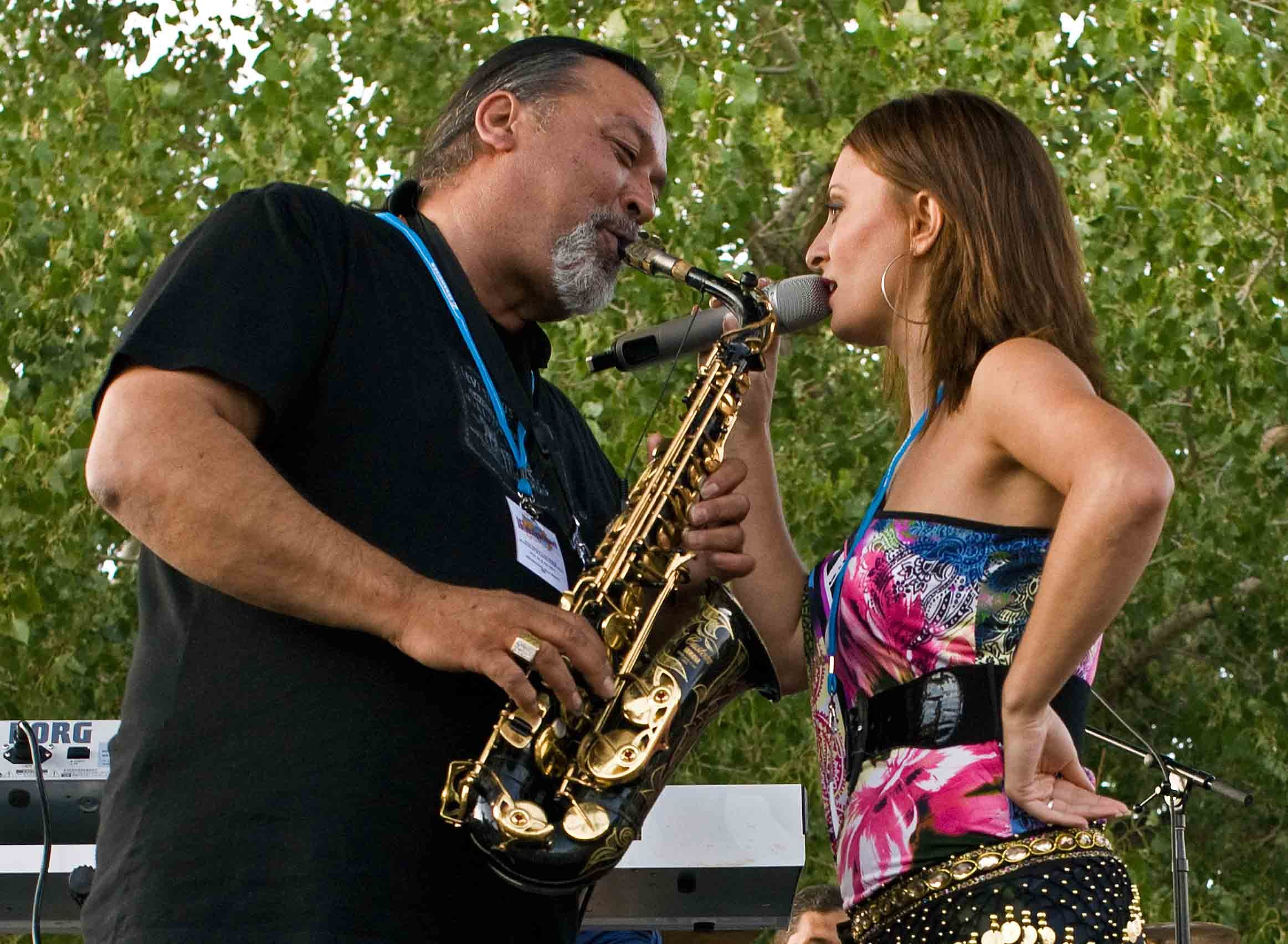 Yuri Yunakov Ensemble Bulgarian Wedding Music